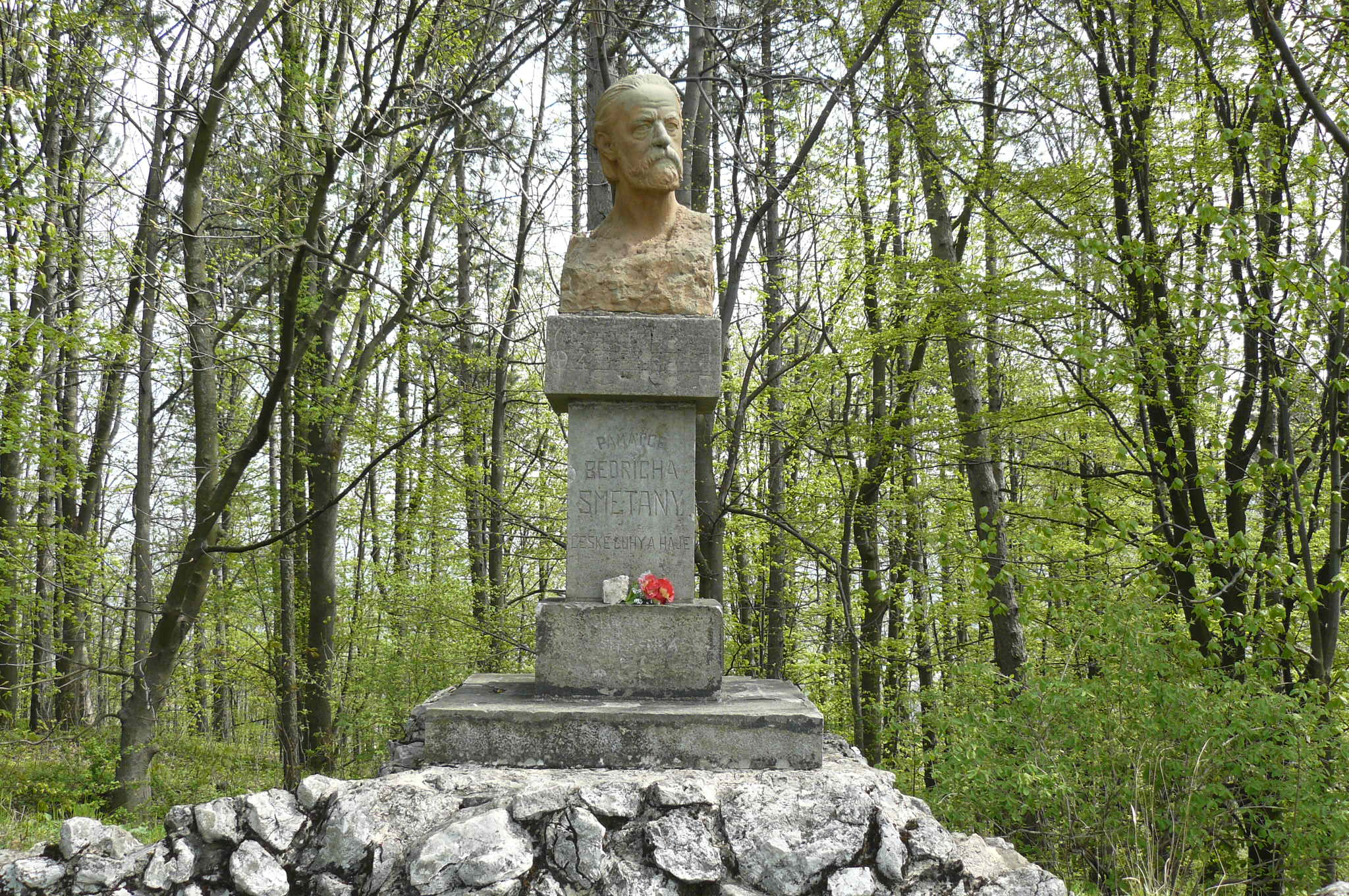 Kotouc - Narodni Sad (Stramberk)